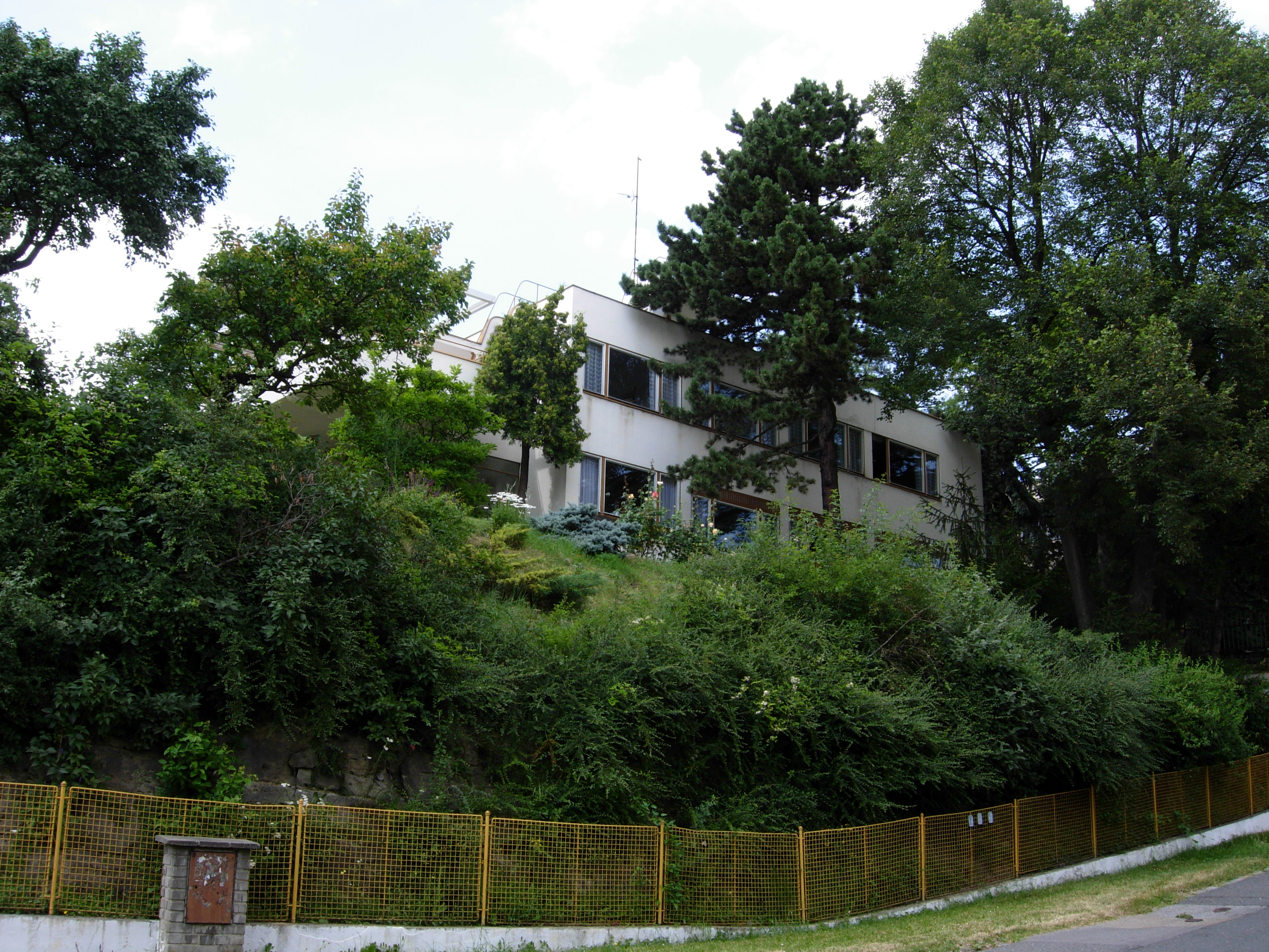 Hainova vila v ulici Na Vysočanských vinicích ve Vysočanech.